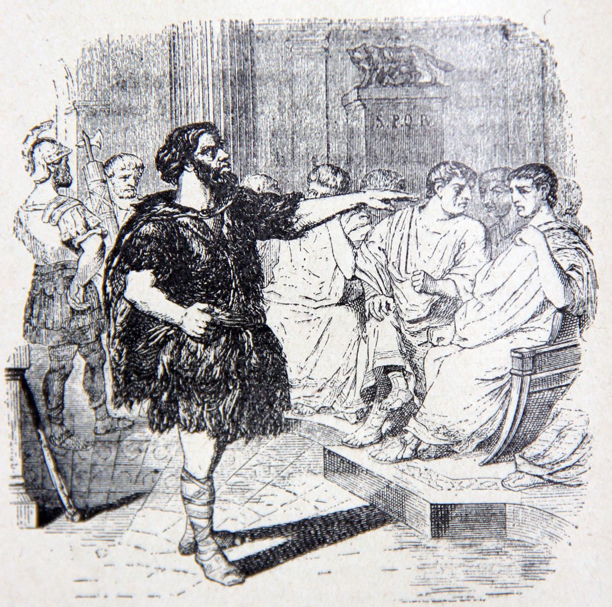 J.J. Grandville. Illustrations des Fables de La Fontaine. 1838-1840.